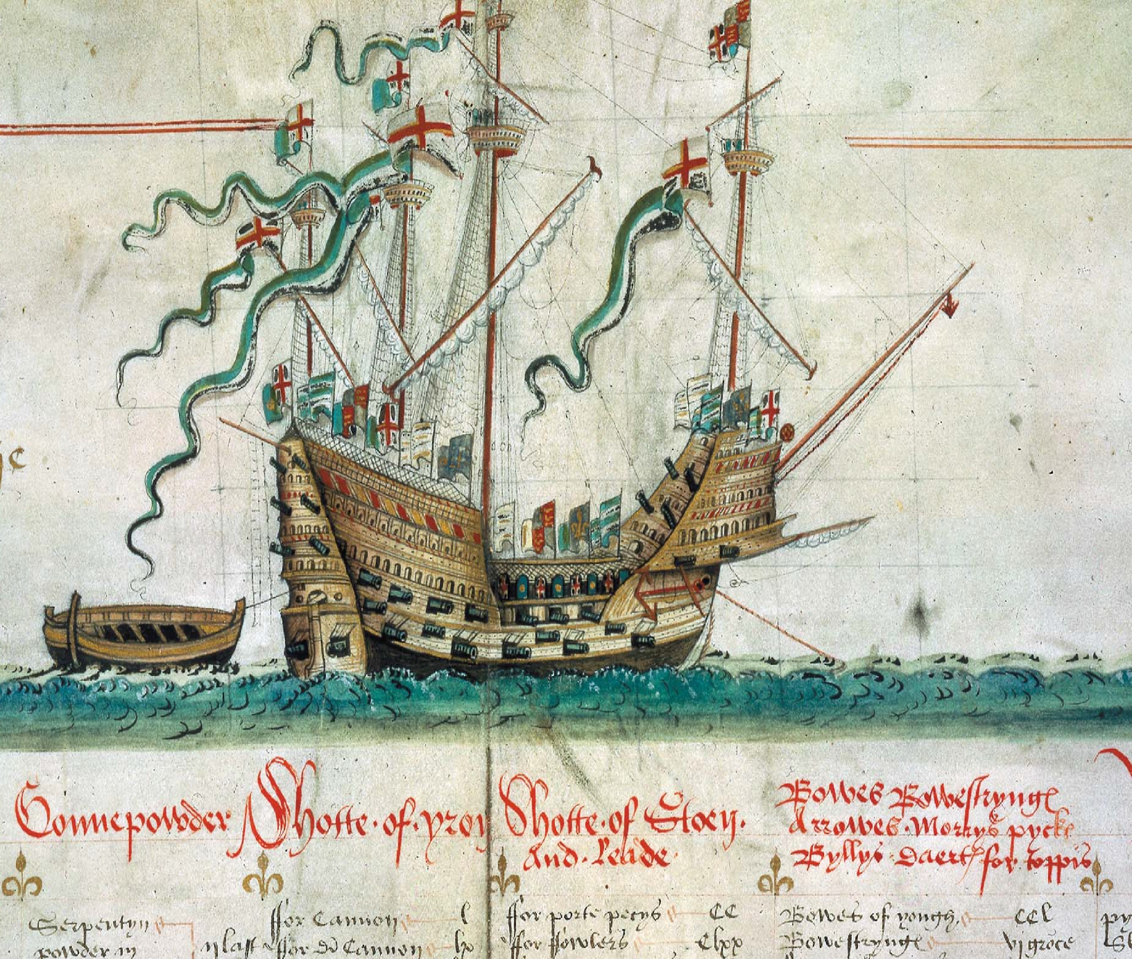 Das Kriegsschiff Mary Rose, dargestellt in der 1546 entstandenen Anthony Roll.